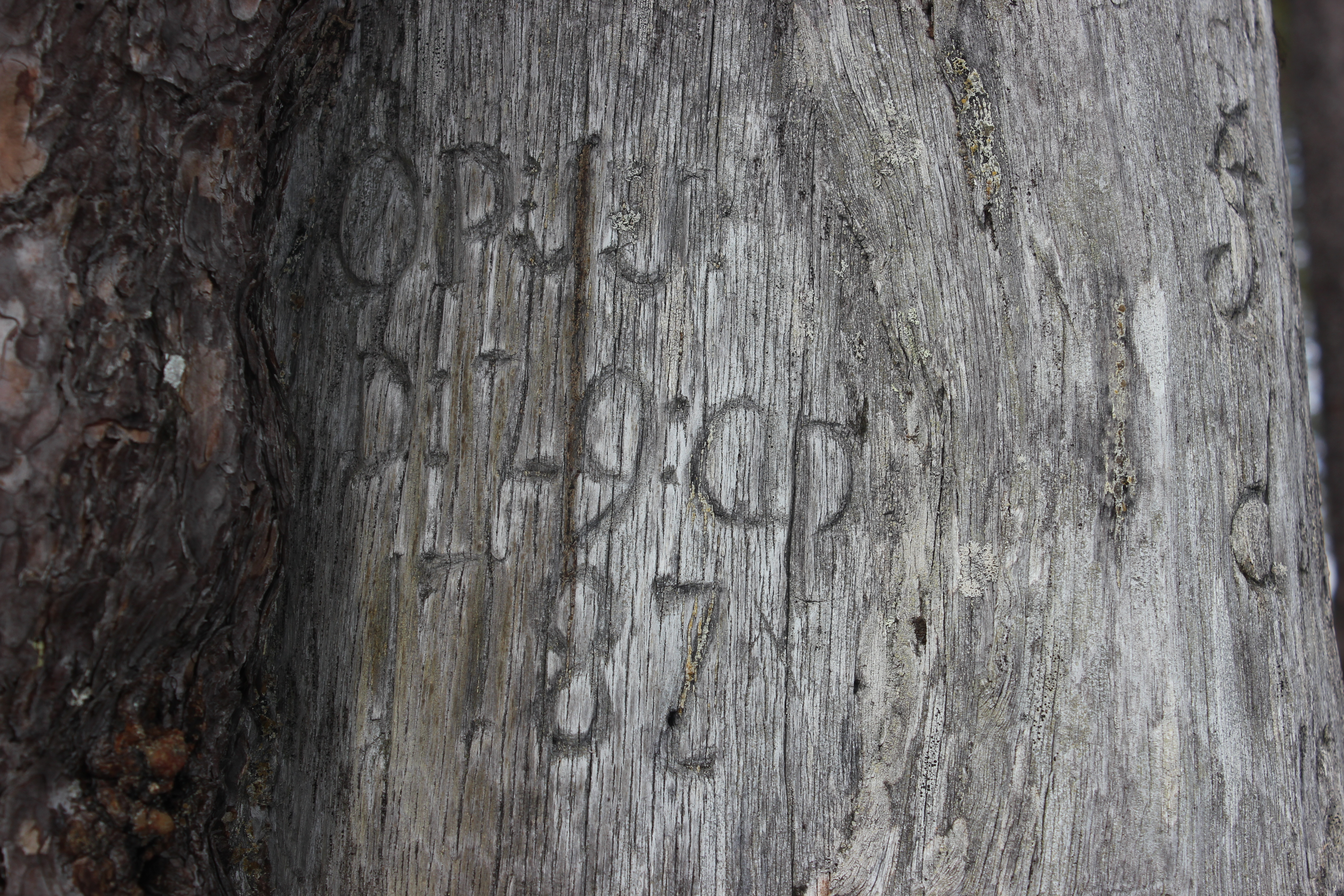 Foto: Lars Bugge Aarset